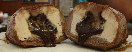 l'ORIGINALE TARTUFO DI PIZZO TRAMANDATO Direttamente dal Creatore è gustabile anche presso il Bar Gelateria Ercole